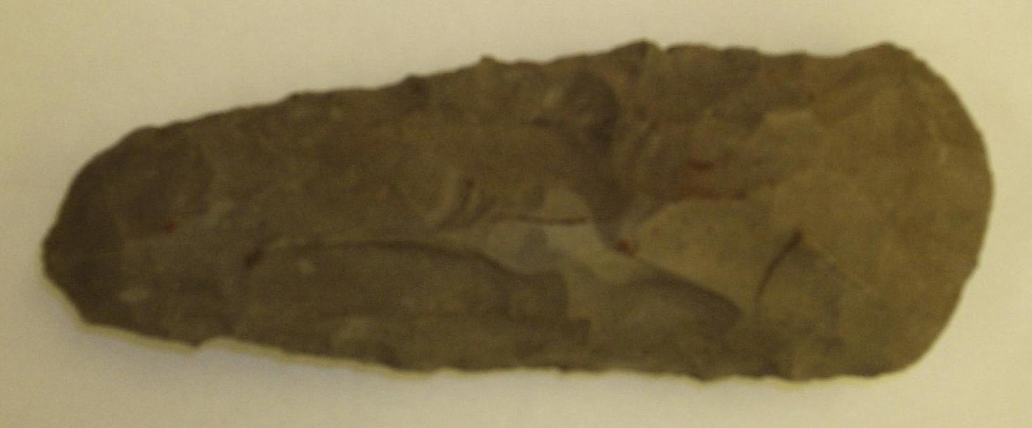 En icke färdiggjord mesolitisk yxa (Under stenåldern såsom idag blev mycket halvgjort, innan man bestämde sig för att kassera sitt objekt.), fotograferad den 18 oktober 2005 av Harri Blomberg.